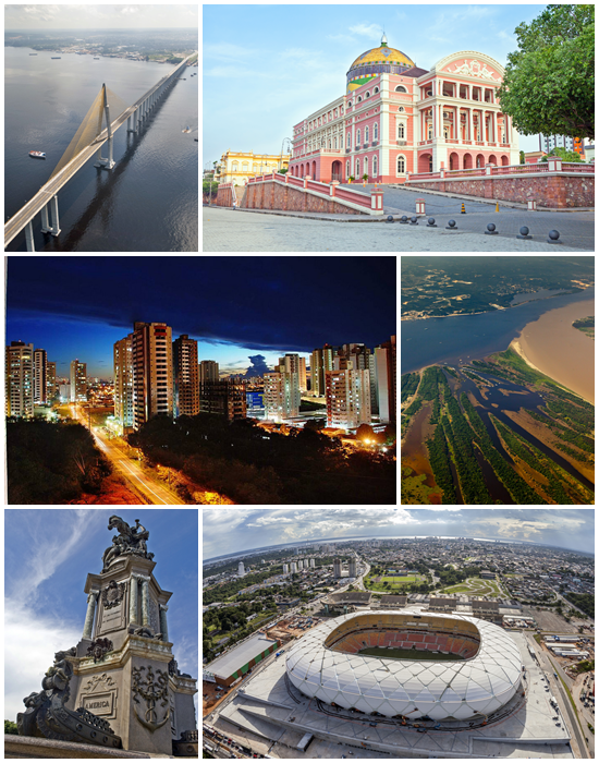 Montagem de Manaus